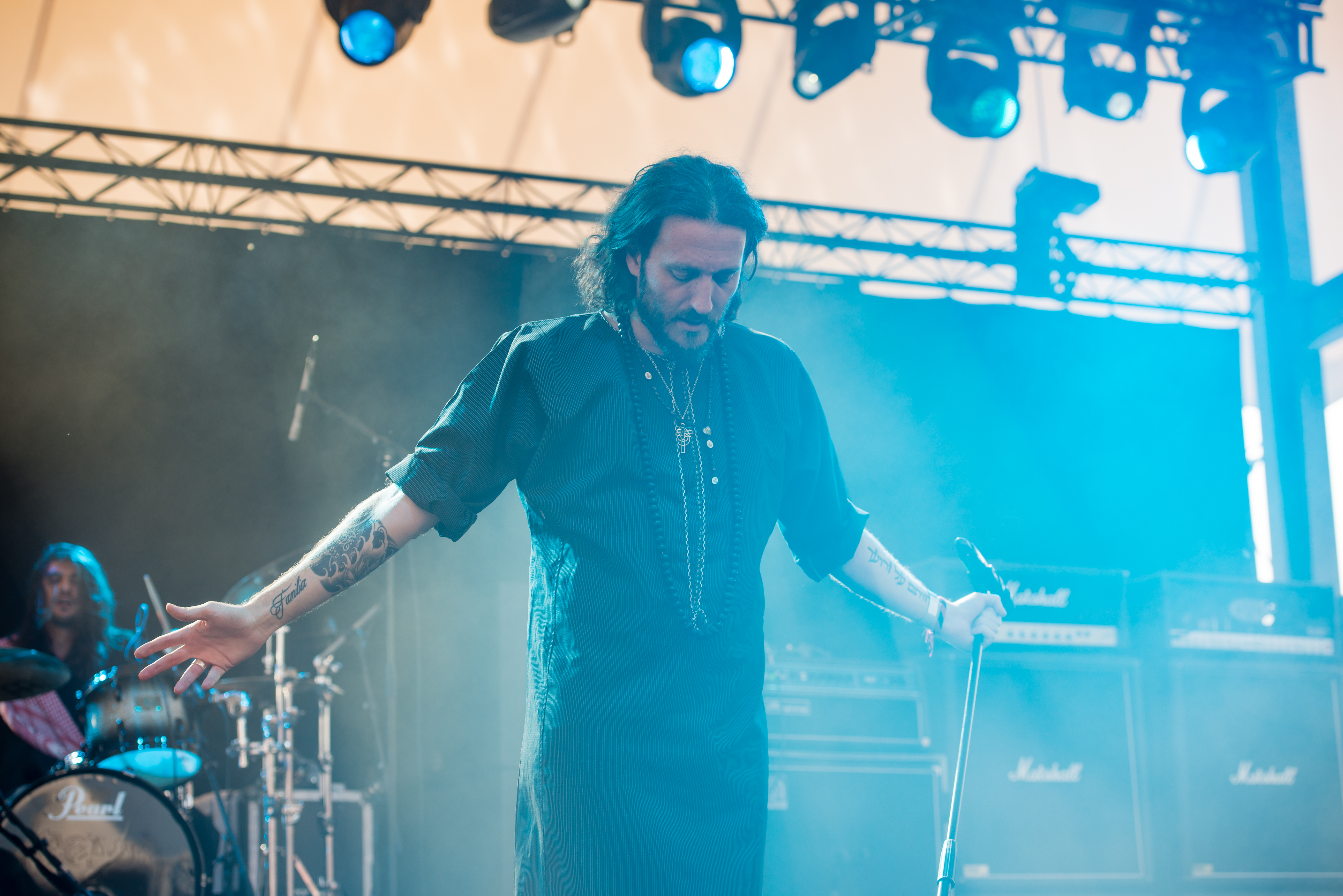 'Rock Hard Festival 2014 - Gelsenkirchen': 'Orphaned Land'